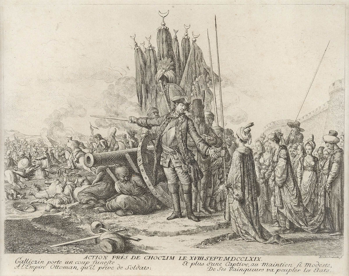 Взятие русскими Хотина. 1769 год